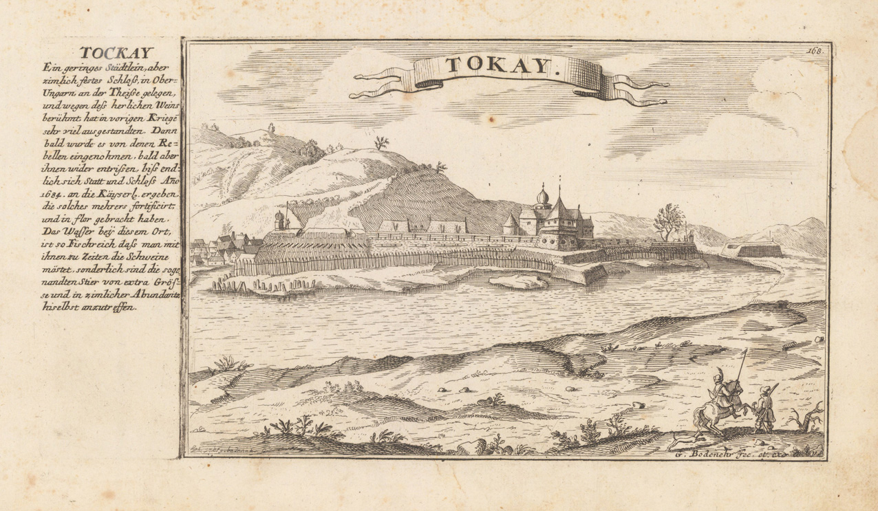 Tokaj vára 1600-as évek végén